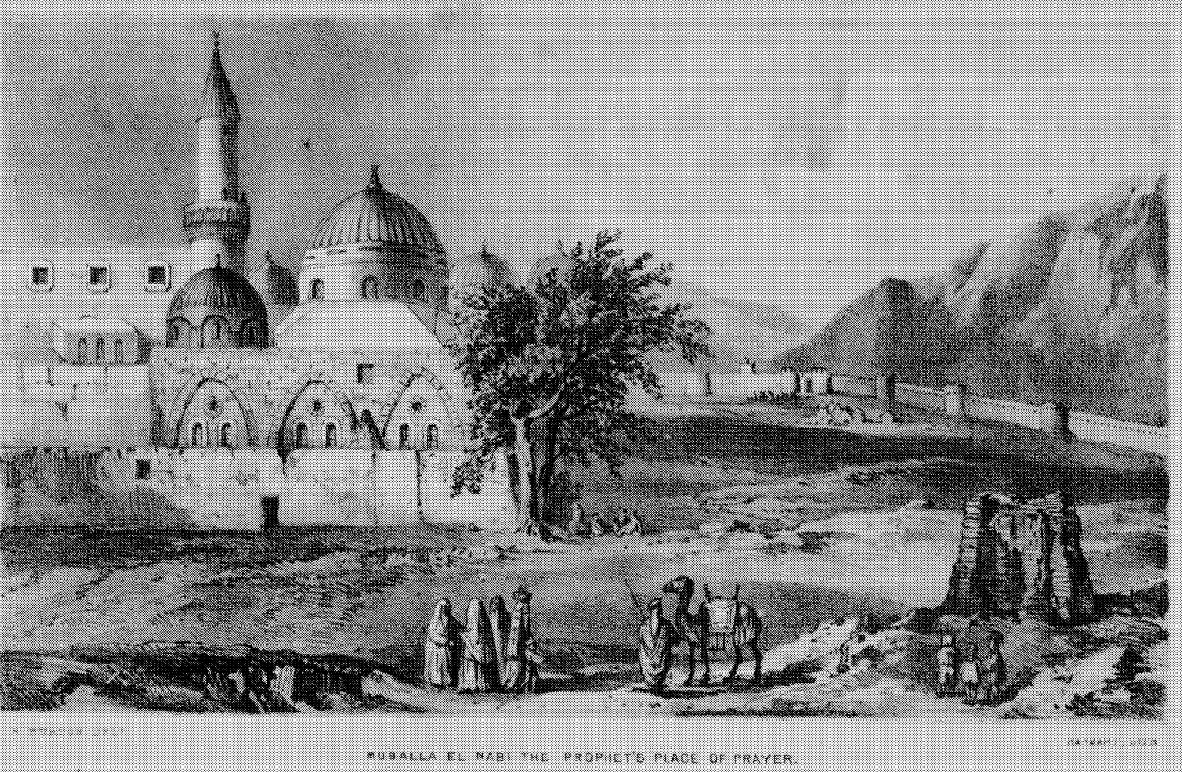 Illustration